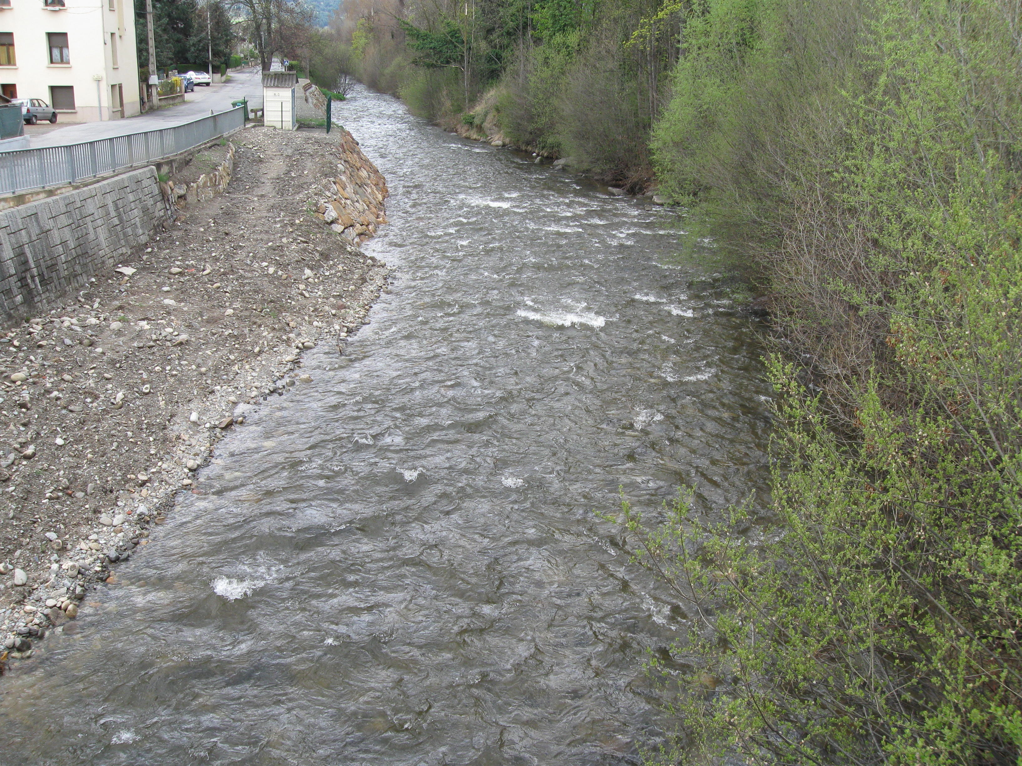 Foto del río Reür realizada desde el puente internacional que une Puigcerdá con Bourg-Madame. A la izquierda Bourg-Madame.